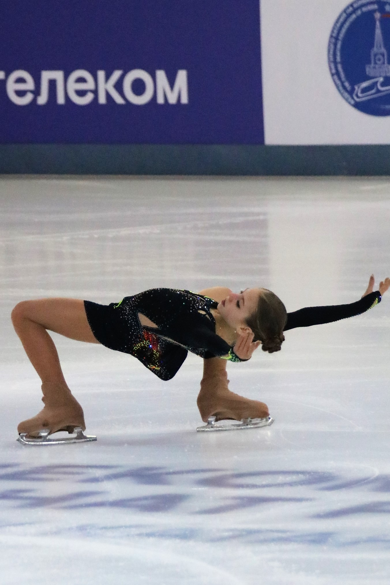 Александра Трусова на чемпионате России по фигурному катанию на коньках 2019